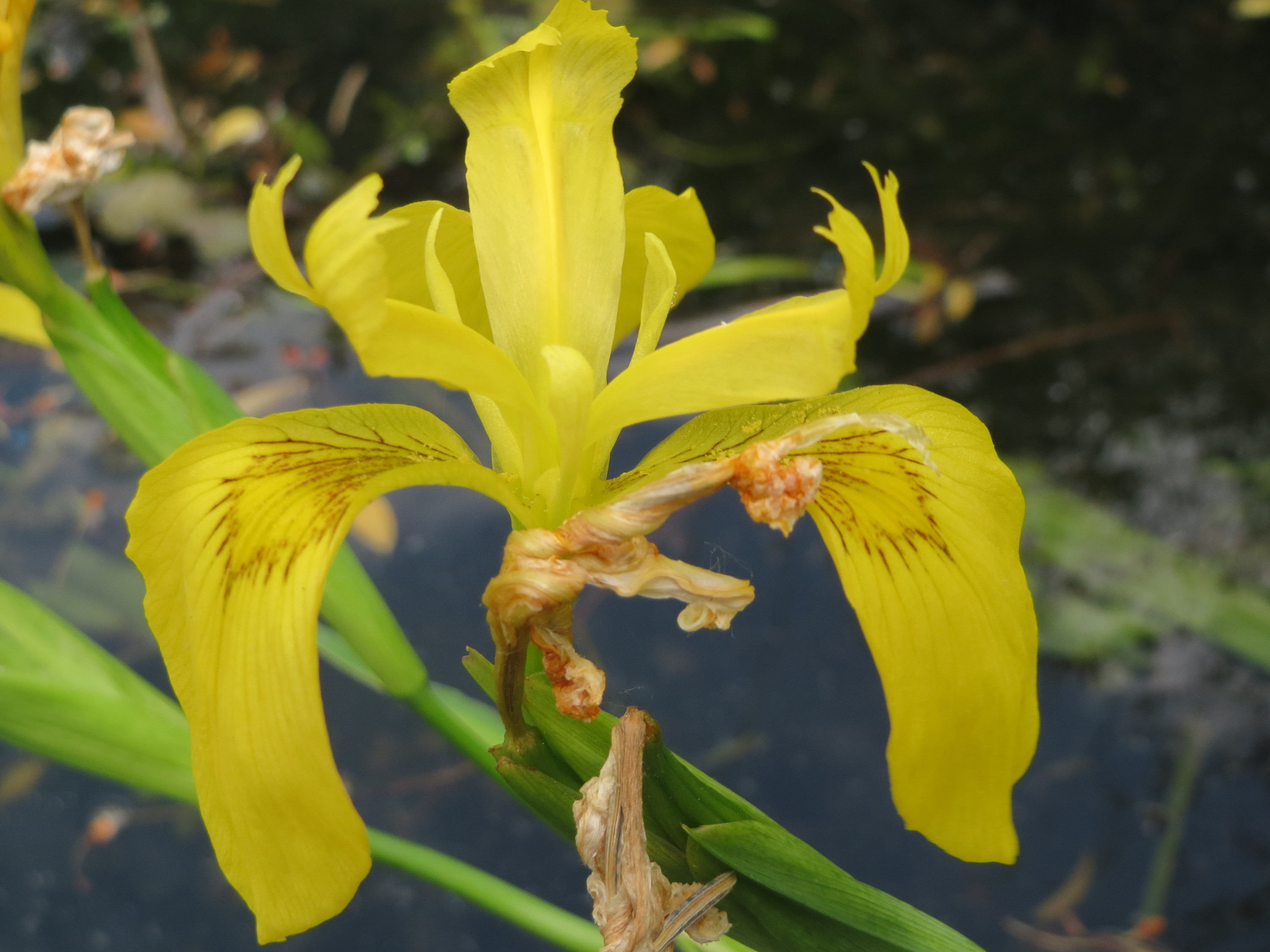 Sumpf-Schwertlilie (Iris pseudacorus) am Staden in Saarbrücken